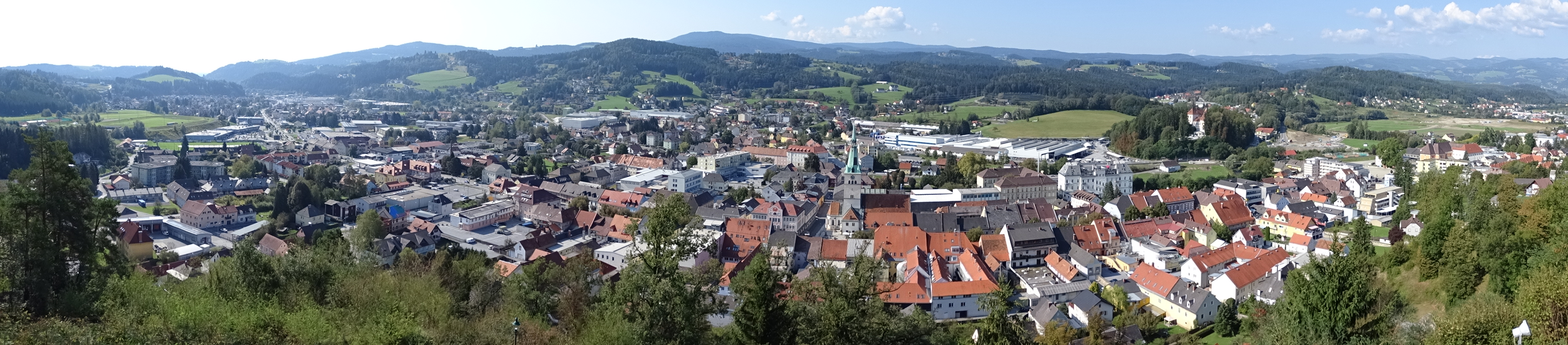 Eine Panoramaaufnahme von Voitsberg von der Burg Obervoitsberg aus